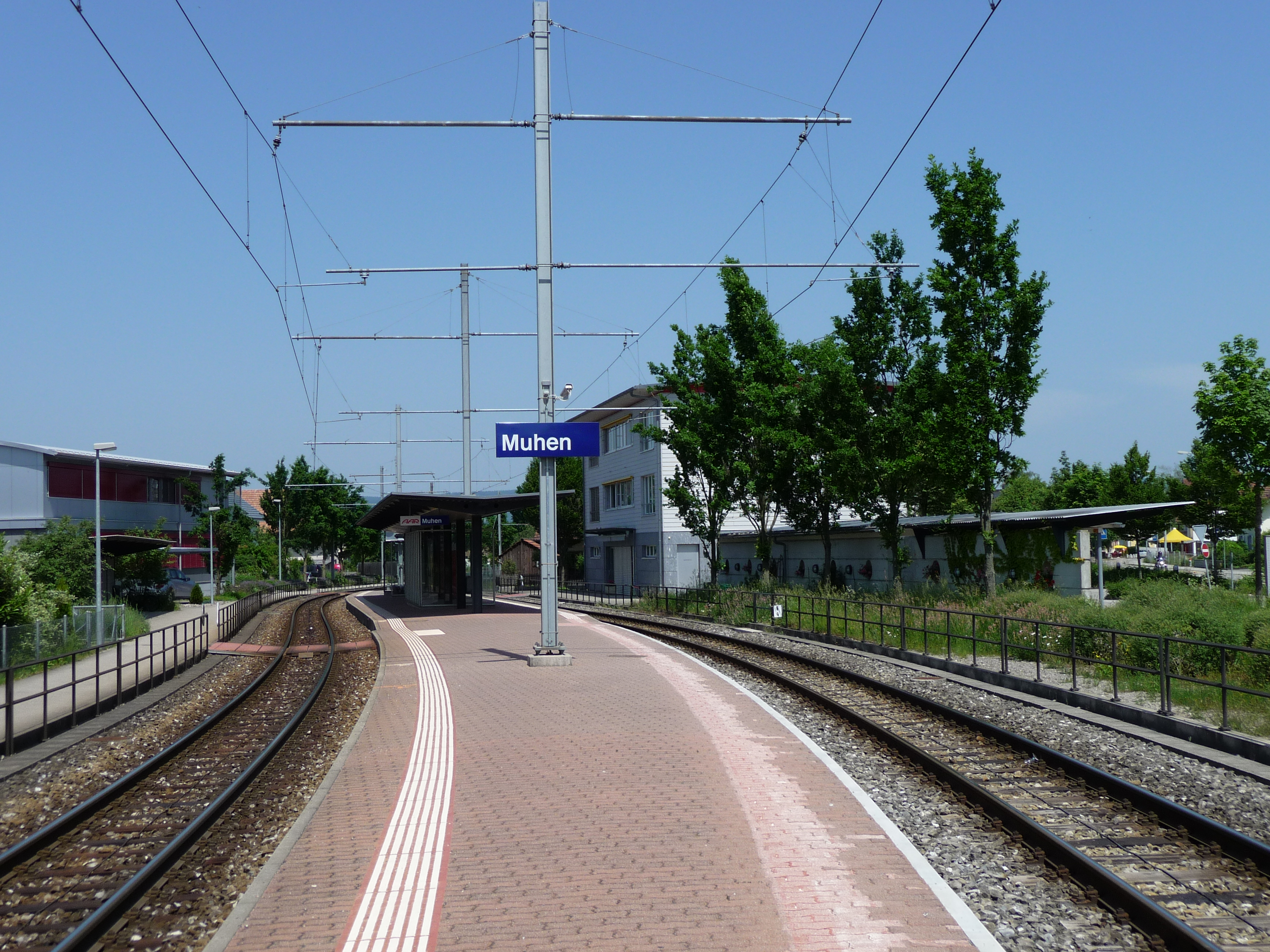 Muhen